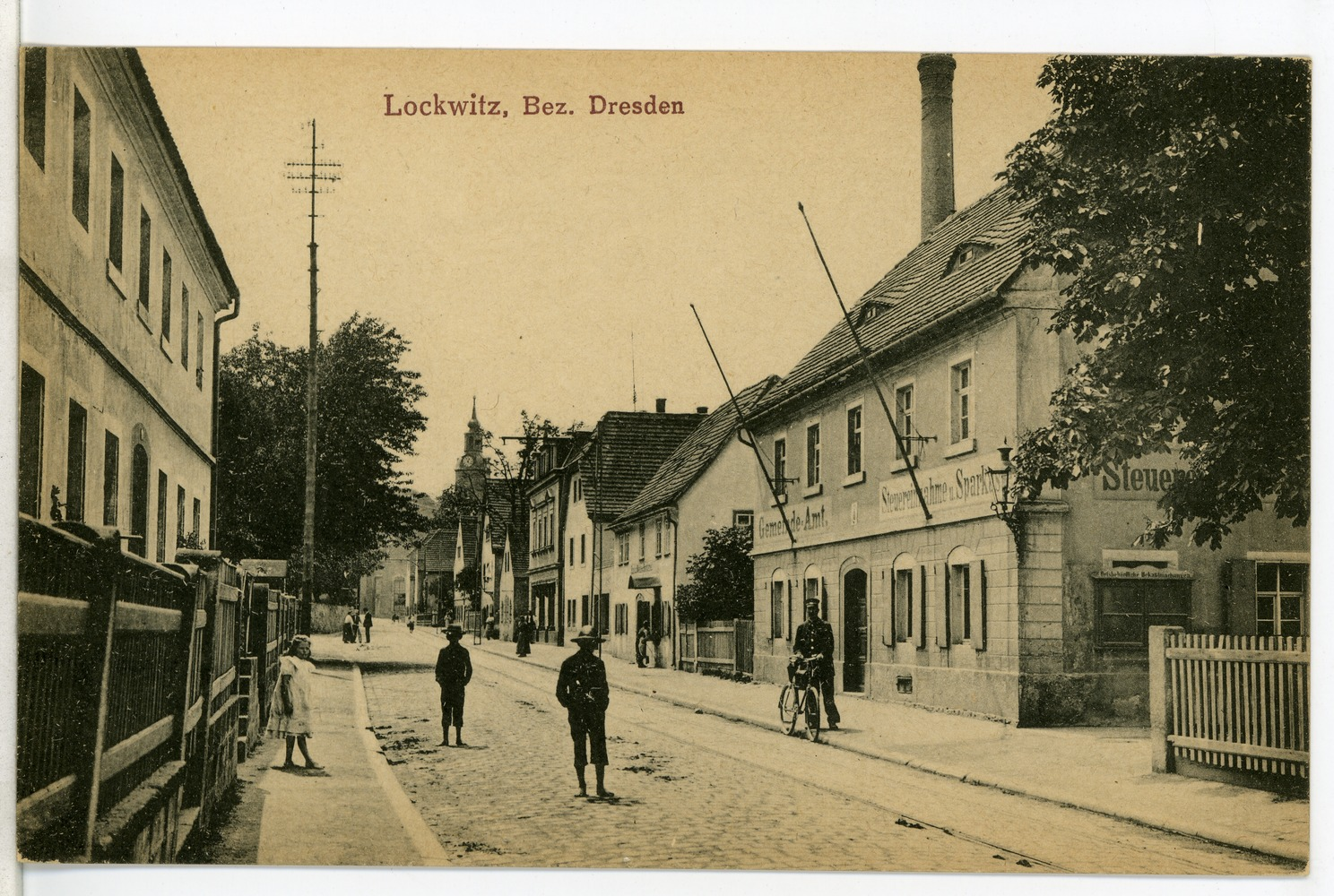 Lockwitz; Gemeindeamt This postcard is from publisher Brück & Sohn in Meißen ( postcard has a unique number 08848 and is available in a higher resolution at the publisher. This images was uploaded in a cooperation project between Wikipedians and the publisher.